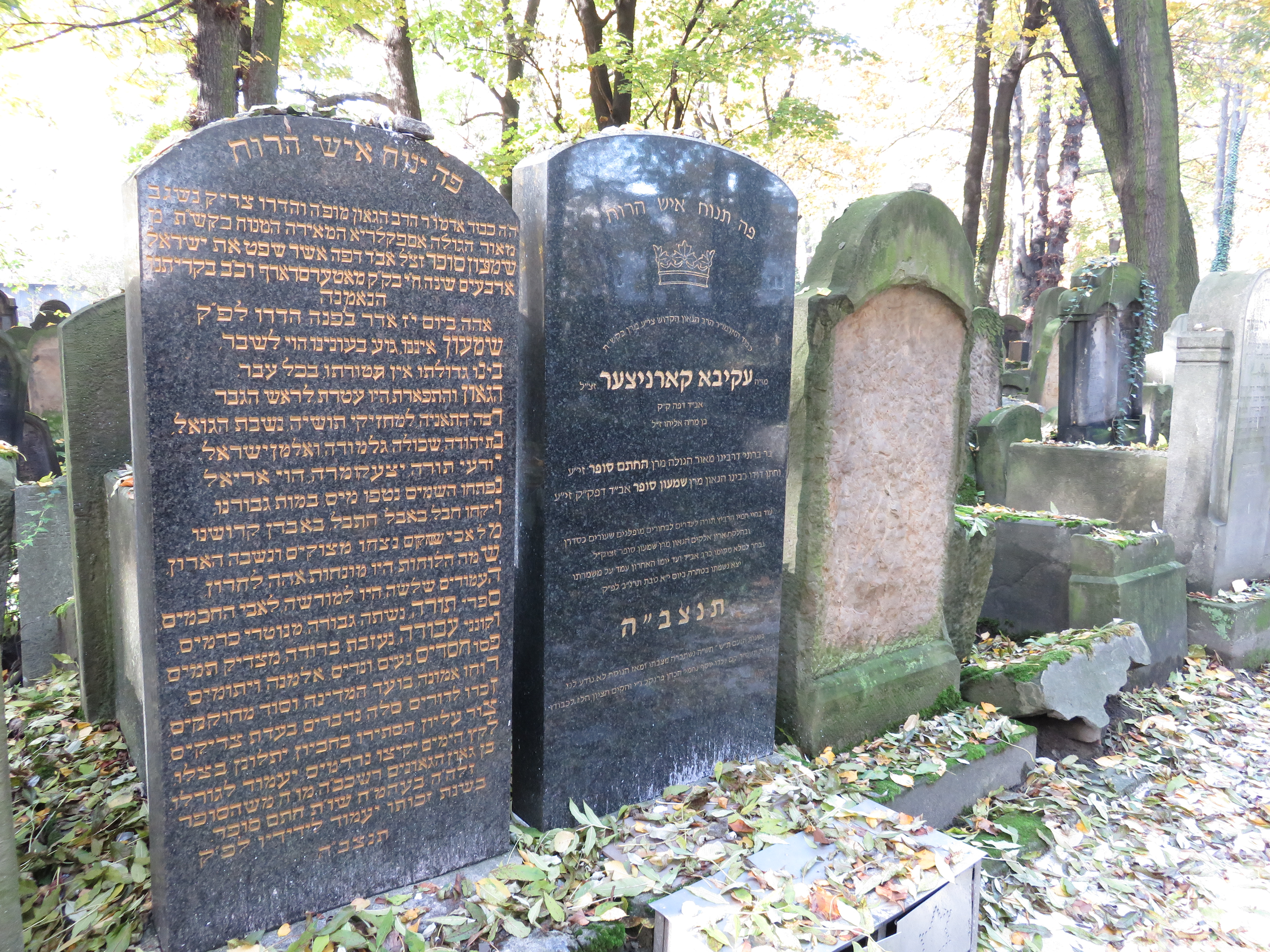 מצבת המכתב סופר וחתנו ר' עקיבא קורניצר. קרקוב.jpg